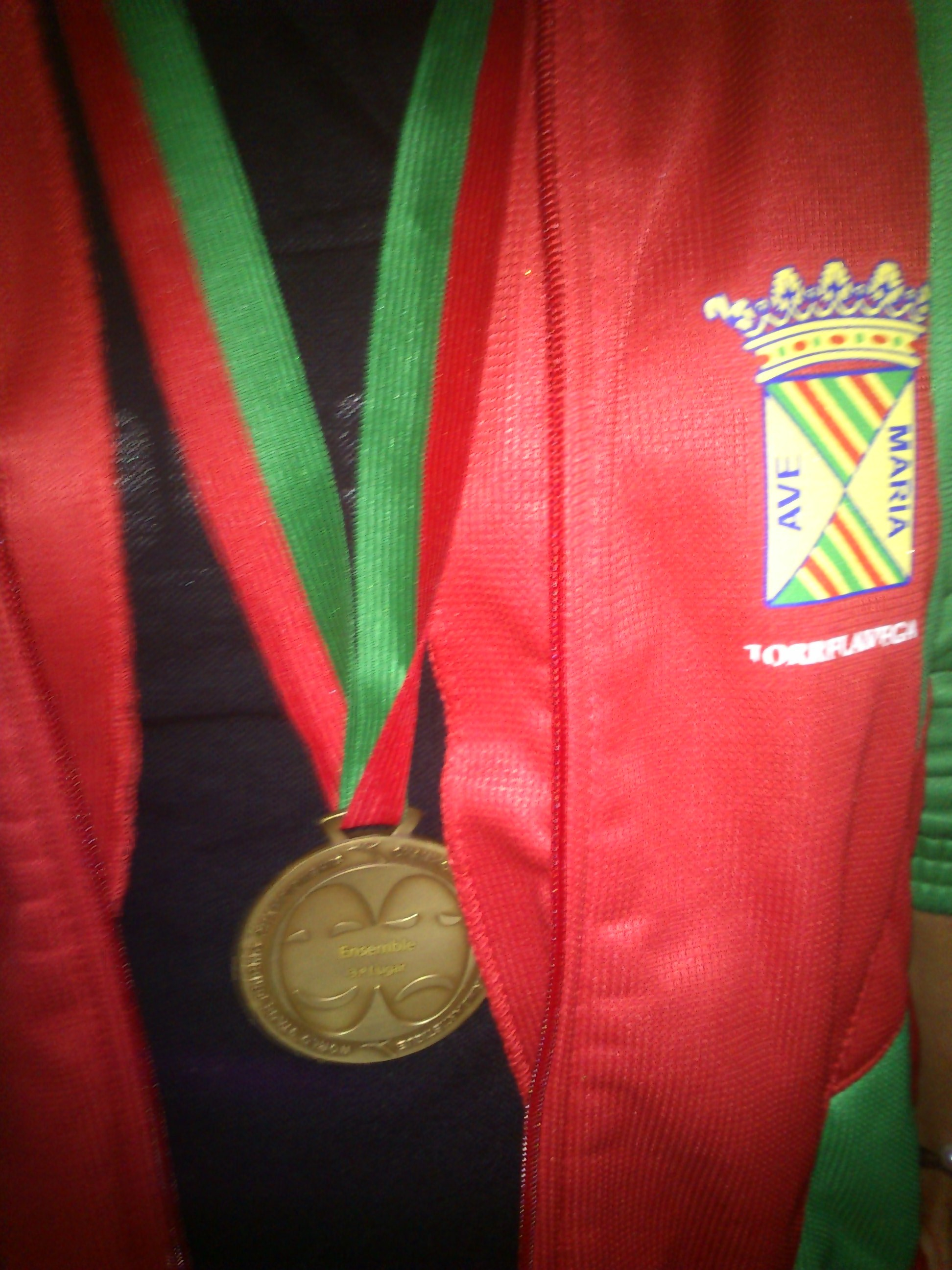 La primera medalla de esgrima artística española fue en el año 2012, con la Sala de Armas Louis XIV,de Torrelavega, en Estoril - Cascais (Portugal)